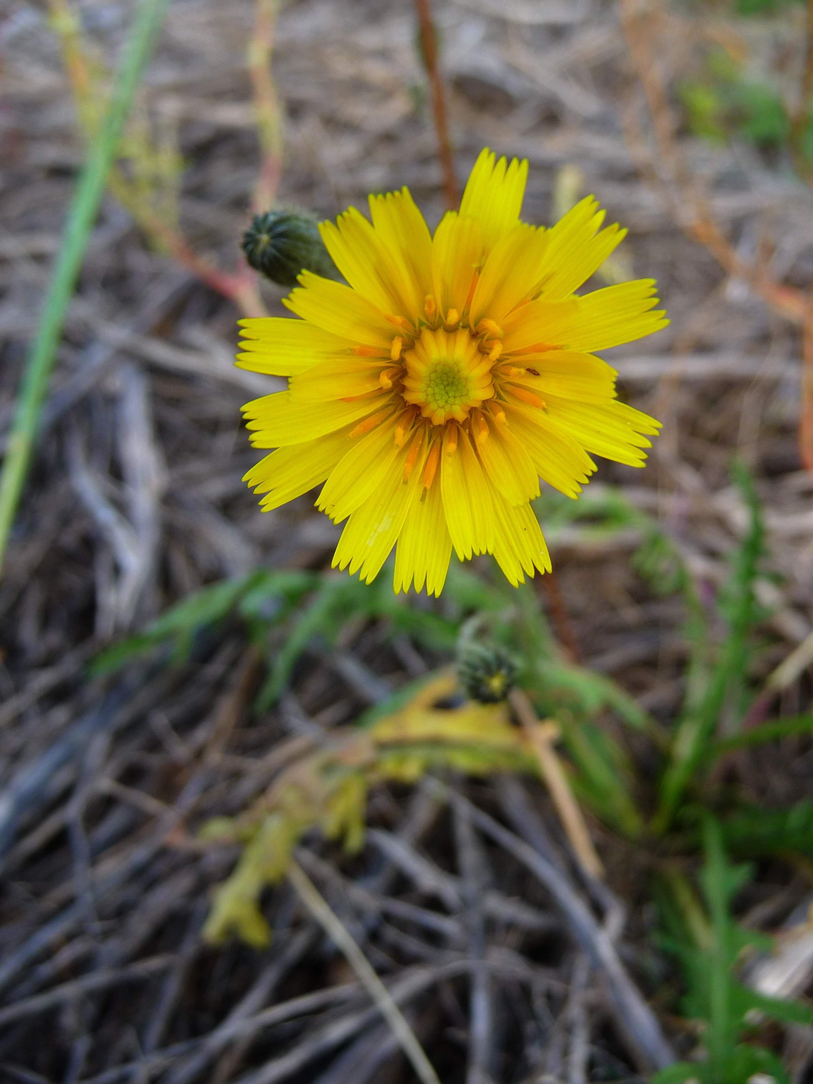 Blüte des Gemeinen Ferkelkrauts (Hypochoeris radicata), fotografiert auf der ostfriesischen Nordseeinsel Juist (Niedersachsen, Deutschland)